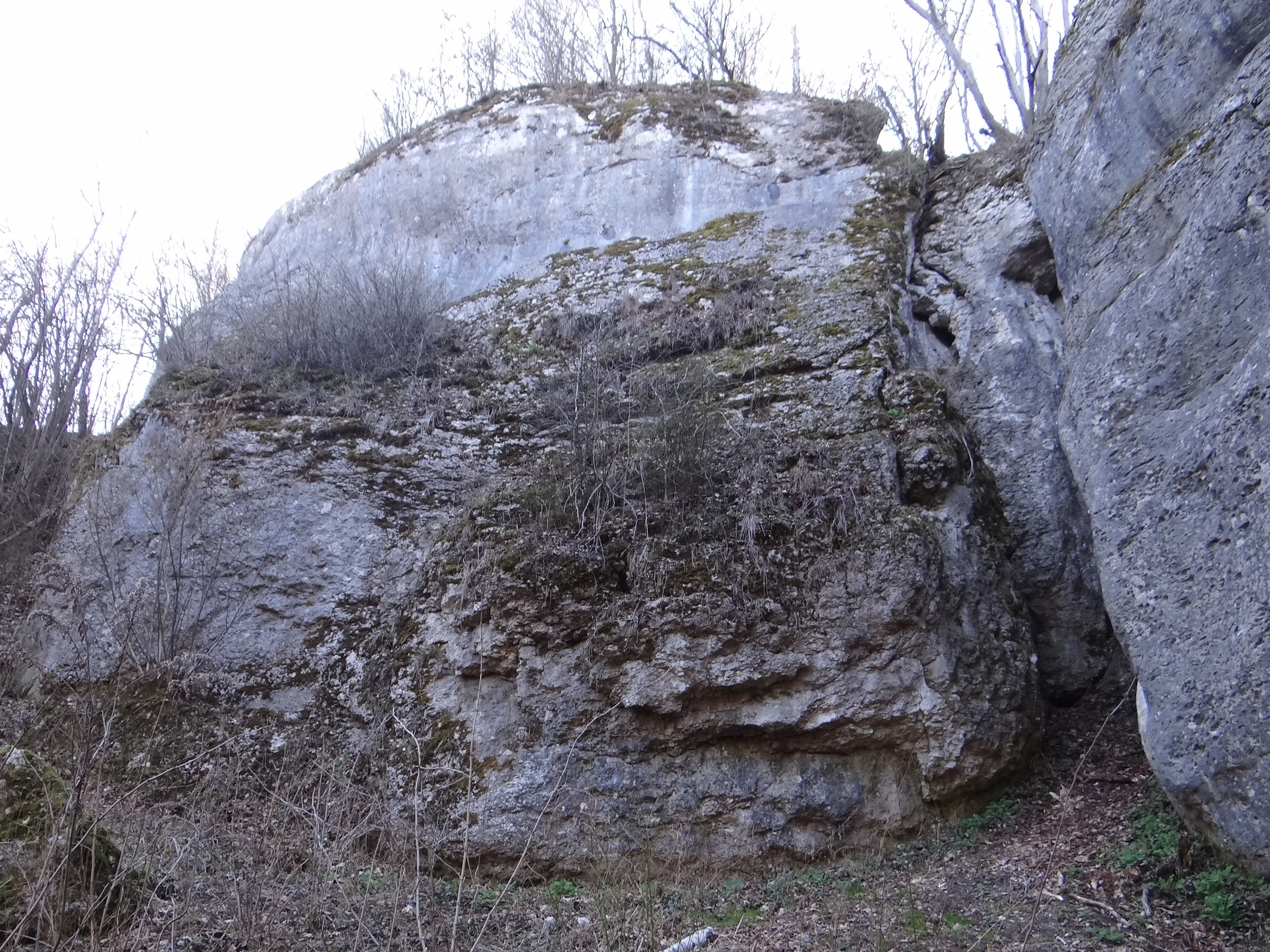 Skała Położna w Dolinie Brzoskwinki